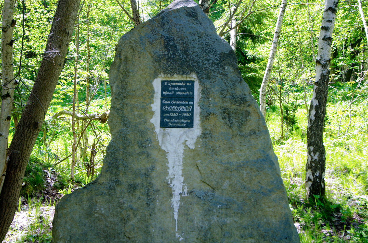 Smrkovec, Slavkovský les, památník zaniklé obce, více